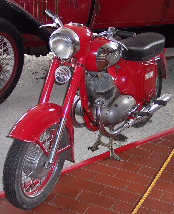 Jawa 350 in der Motortechnica Bad Oeynhausen, eigenes Foto